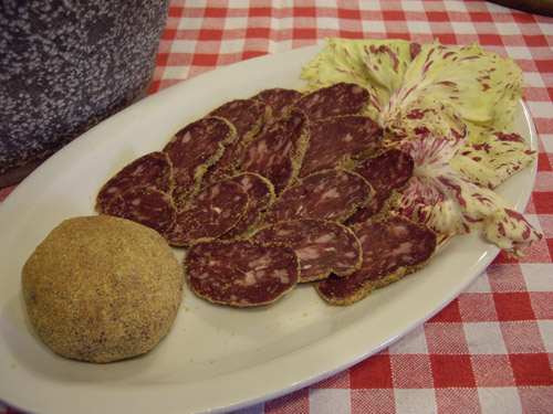 La pitina, prodotto tipico di Tramonti di Sopra: una polpetta di carne di camoscio affumicata